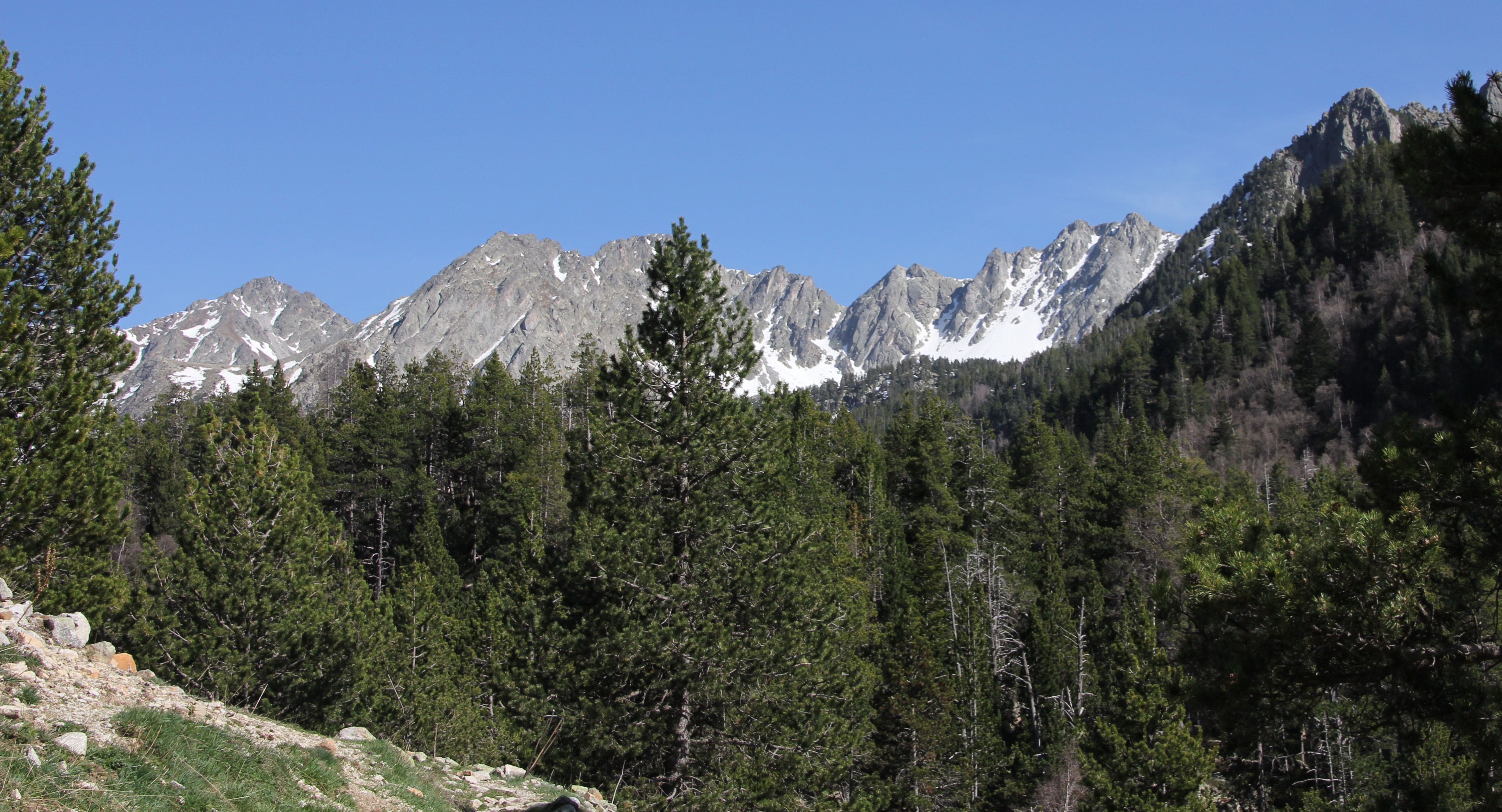 Vall del Madriu-Perafita-Claror This is a a photo of a natural area in Andorra with id: AD-VMPC